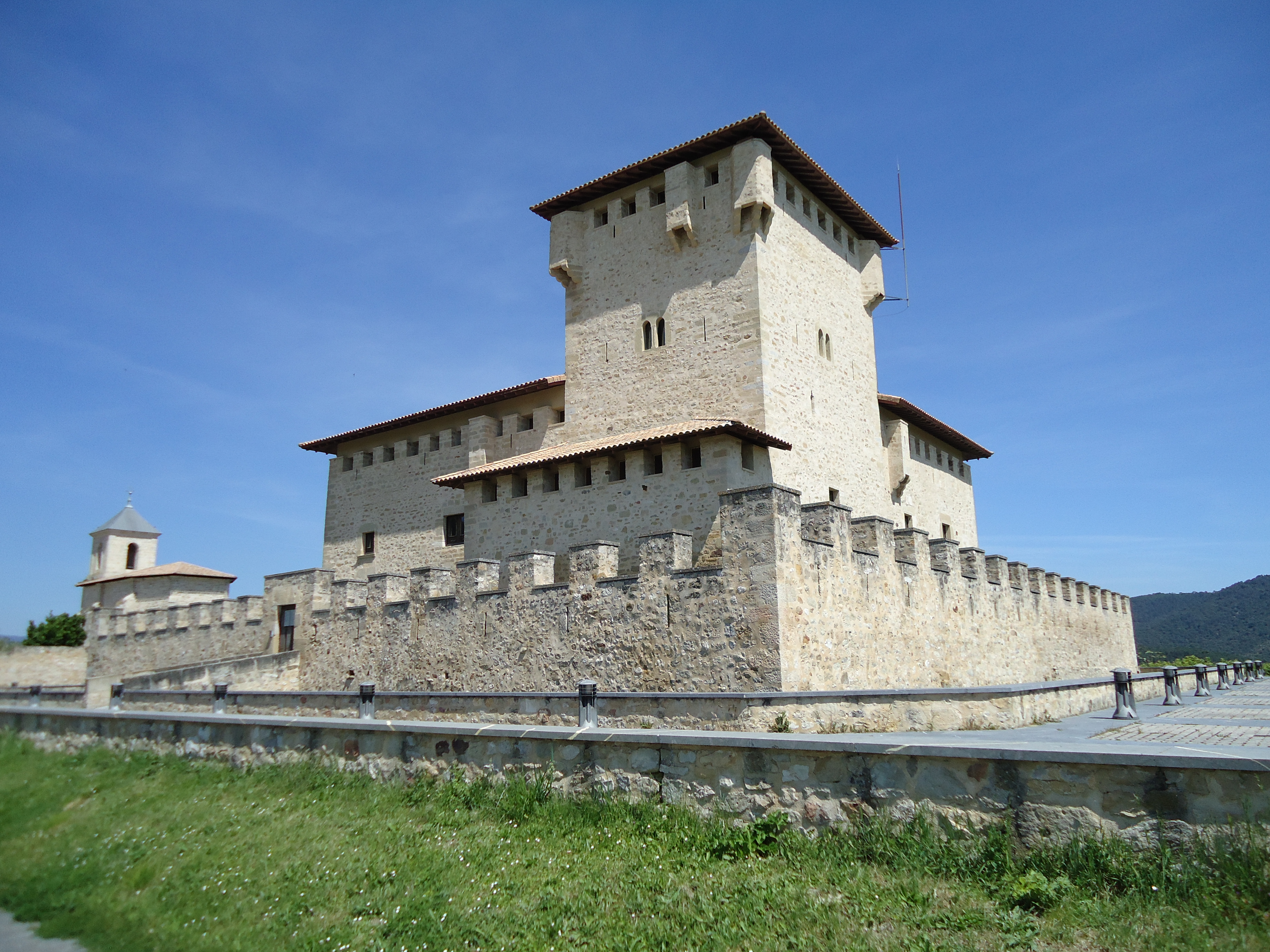 Baronatarren dorretxea